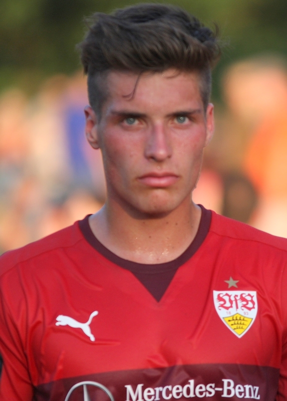 Thomas Hagn nach dem Testspiel gegen Affalterbach. Bild von